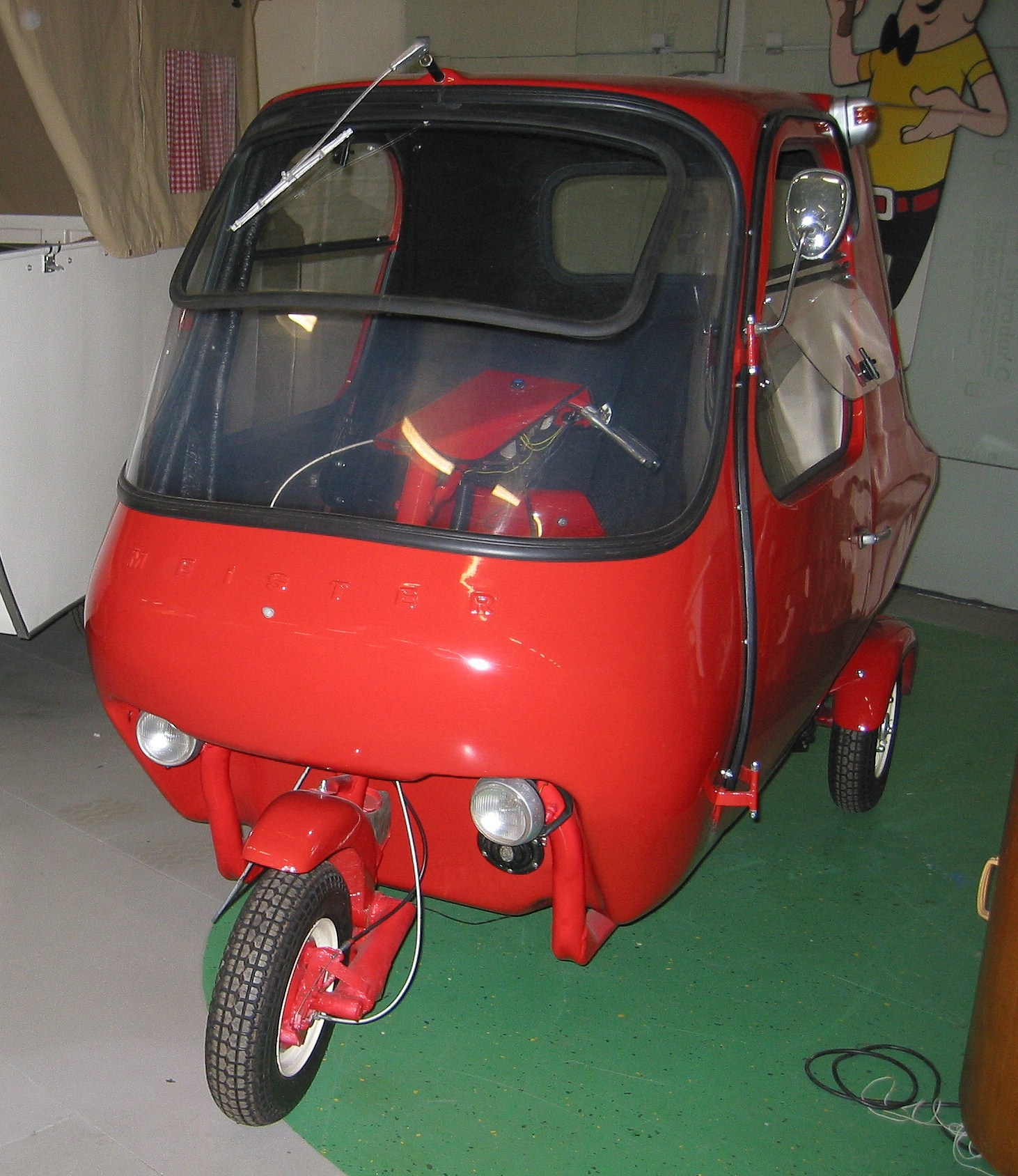 Meister K 5 Kabine von 1969 bis 1973 in der Kleinwagen- und Rollersammlung St. Ingbert